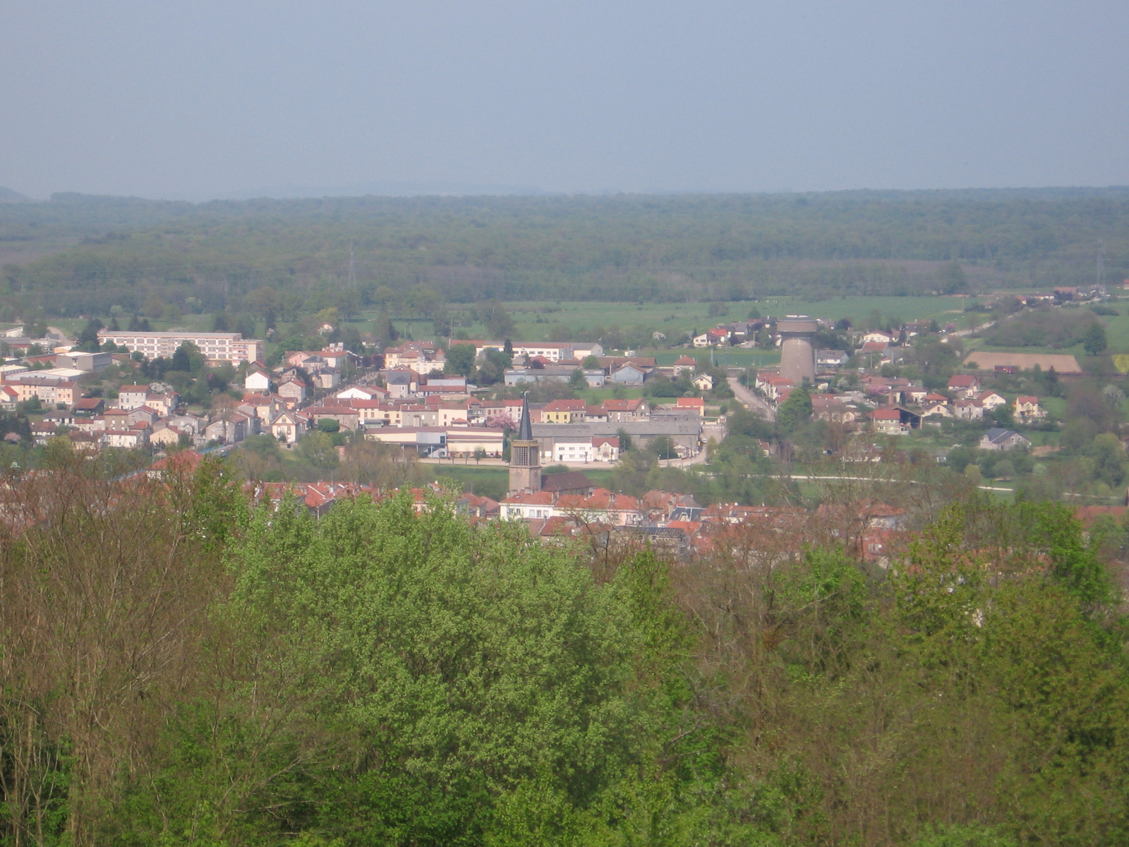 Charmes, view from Monument de Lorraine, may 2006